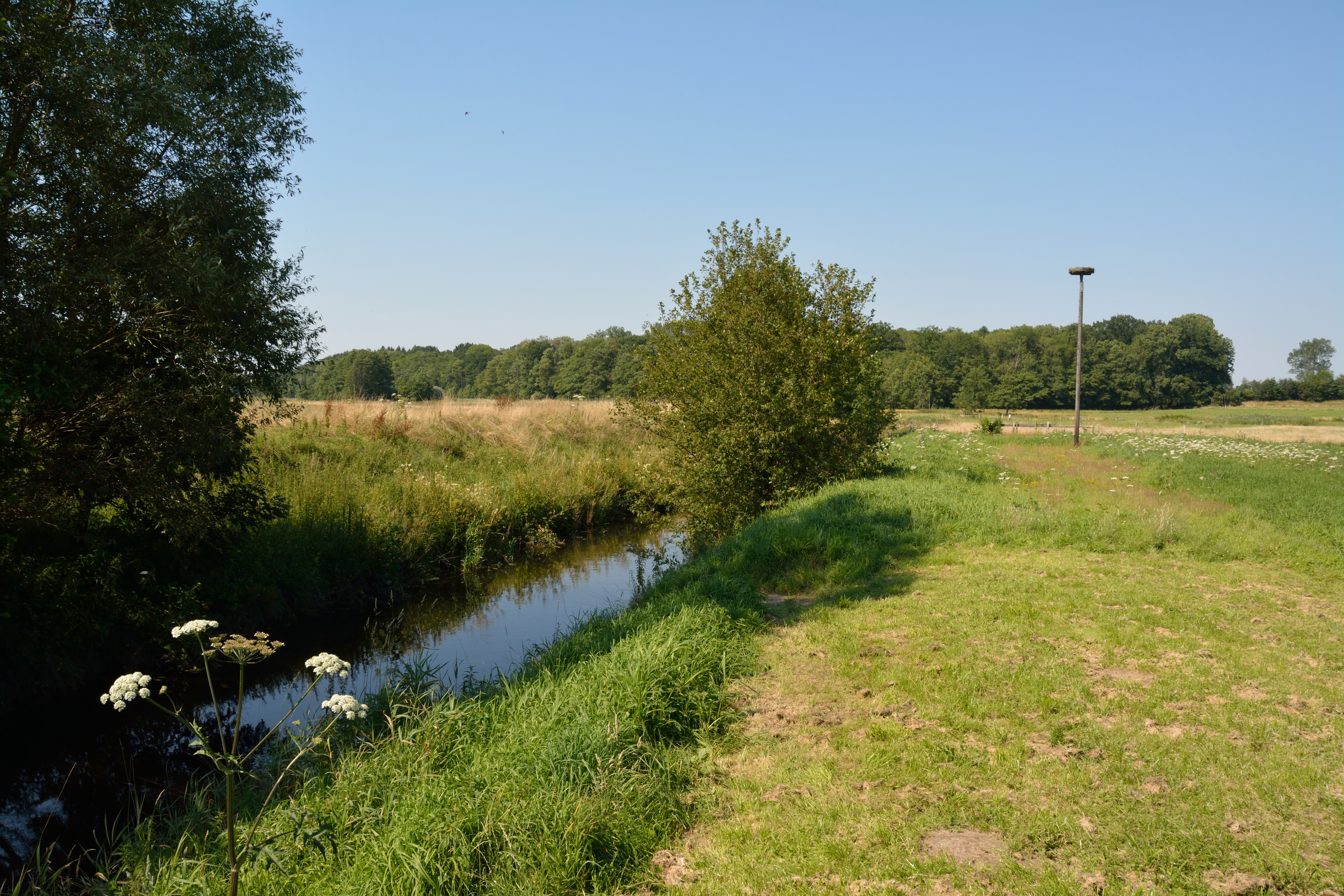 Impressionen aus dem FFH-Gebiet "Rantzau-Tal" an der Brücke in Winseldorf